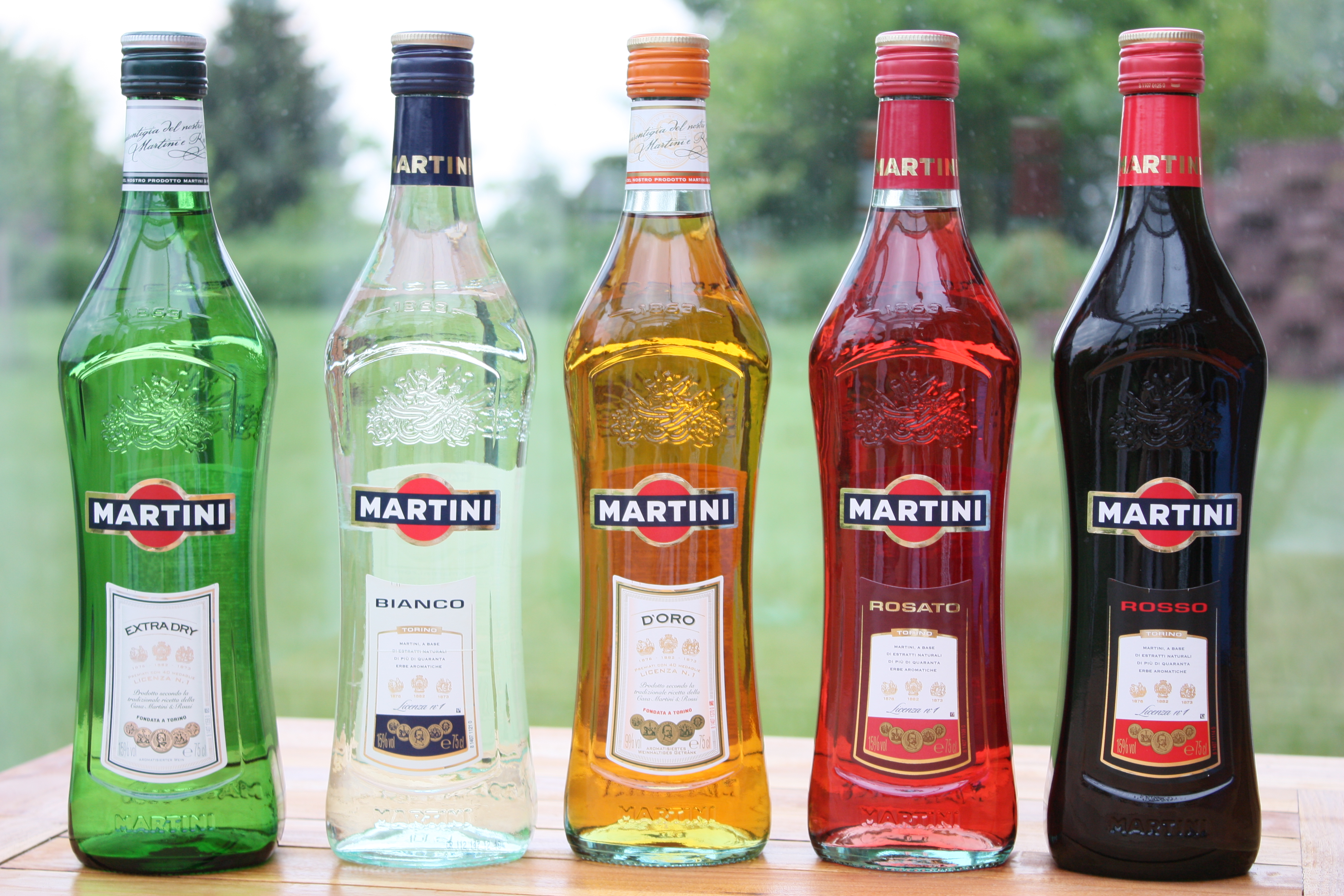 Martiniflaschen